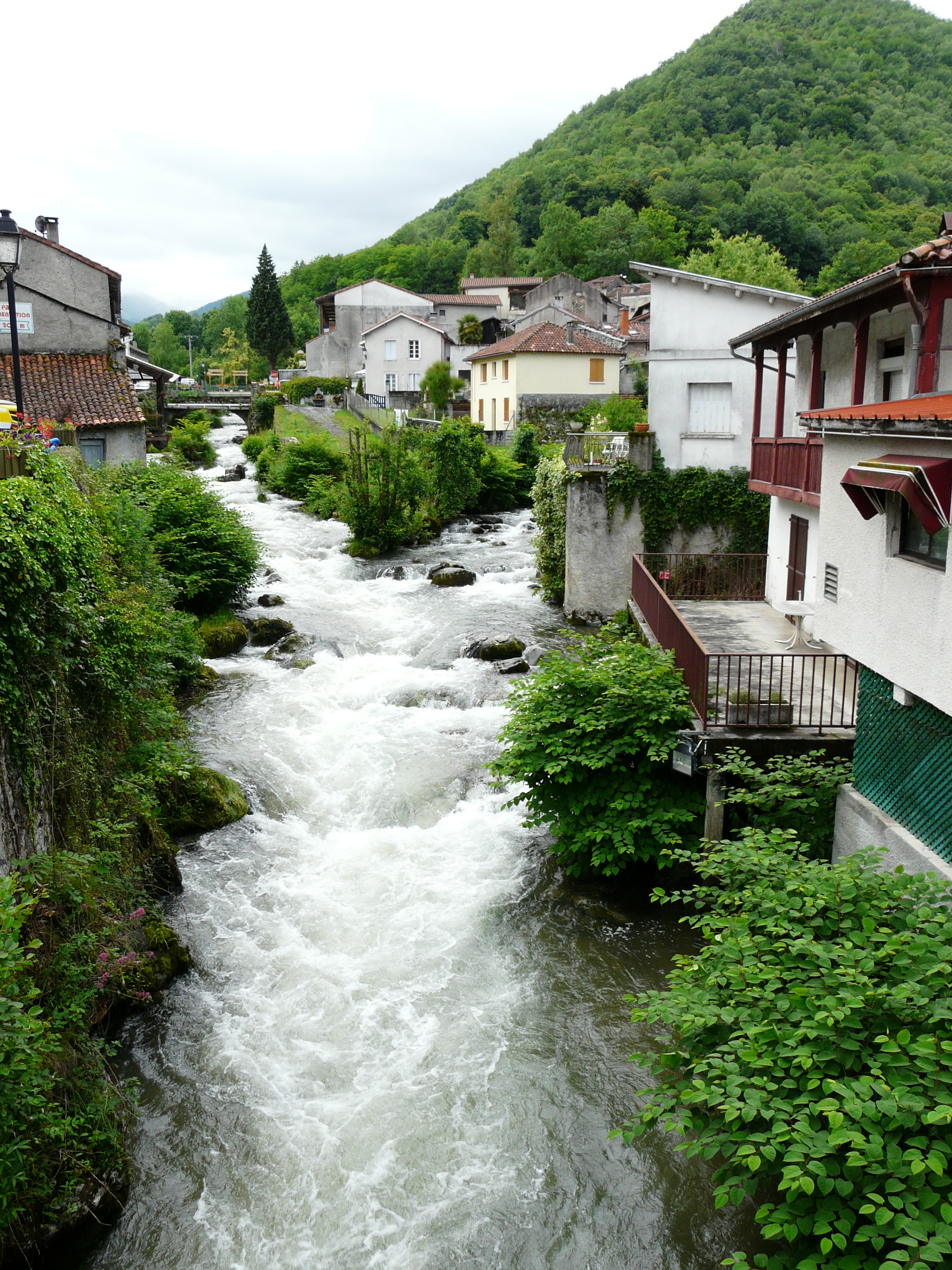 L'Ourse de Sost (à gauche) conflue avec l'Ourse de Ferrère pour former l'Ourse, Mauléon-Barousse, Hautes-Pyrénées, France.